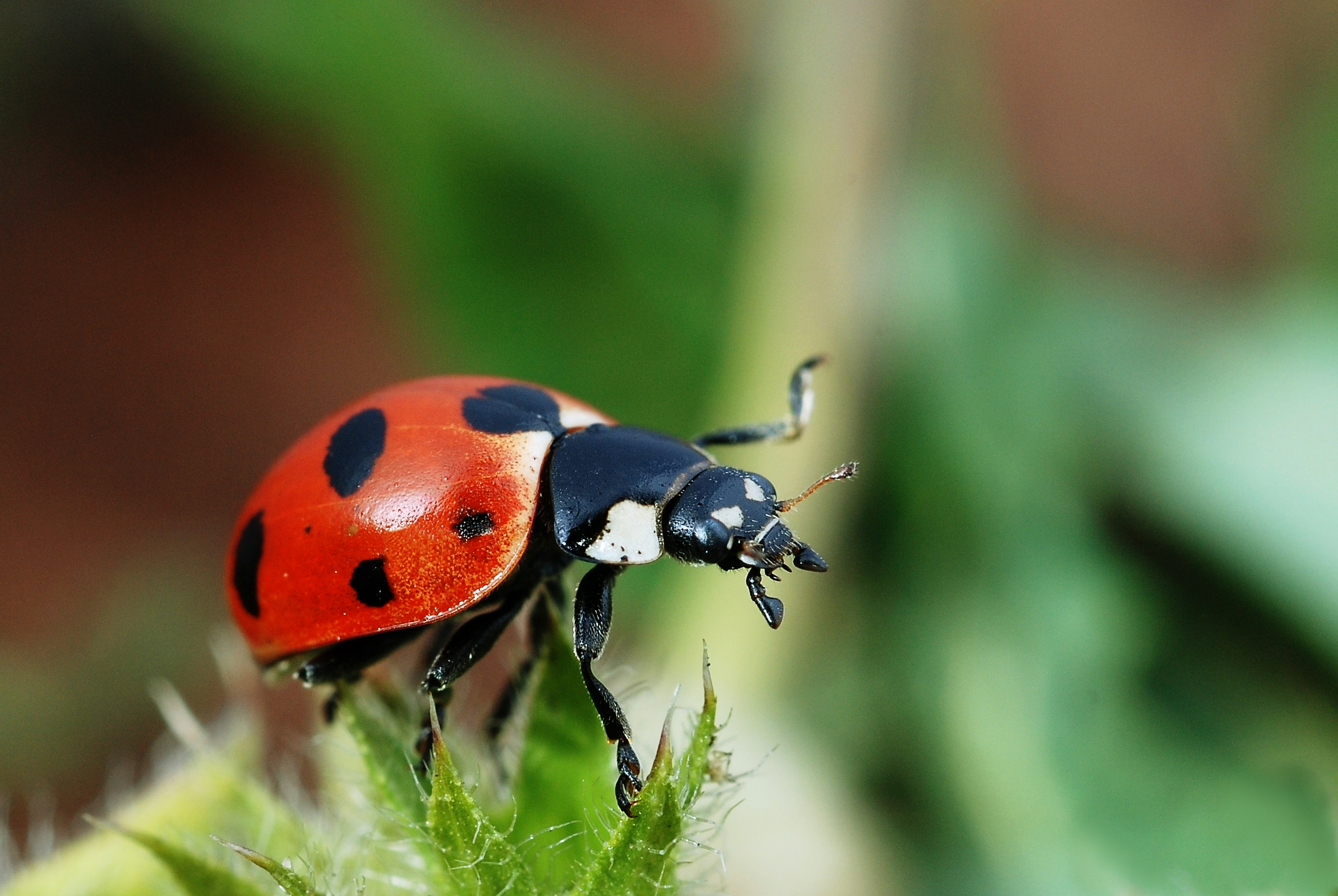 Coccinella magnifica, Parc naturel de la Vanoise, France